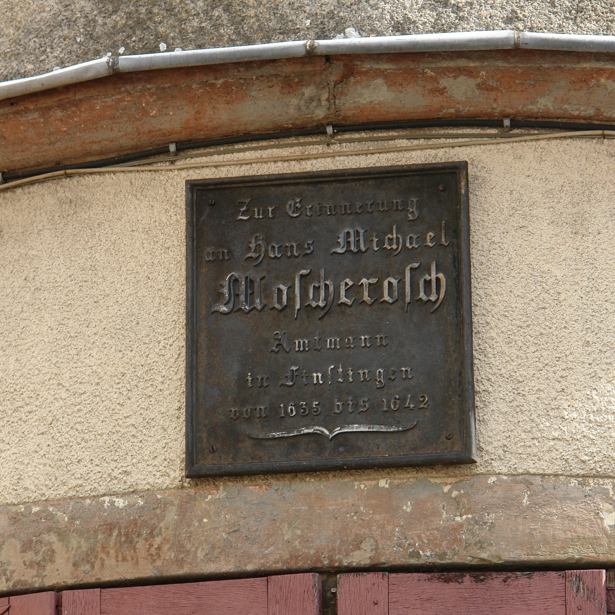 Gedenktafel für die Amtszeit 1635-1642 von J.Michael Moscherosch in Finstingen ( heute: Fénétrange )